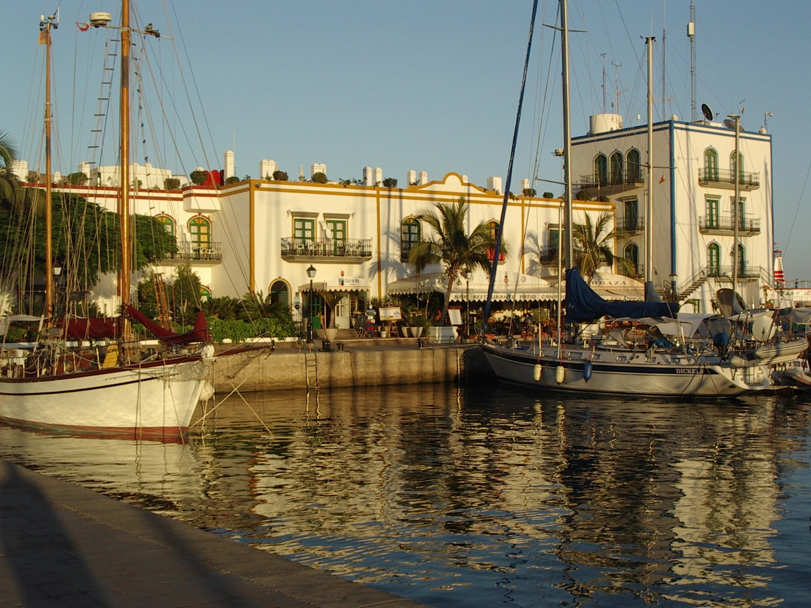 Puerto de Mogan, Gran Canaria